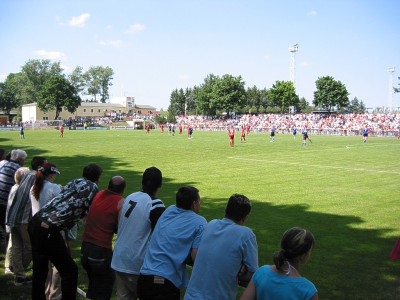 Waldstadion Zeulenroda